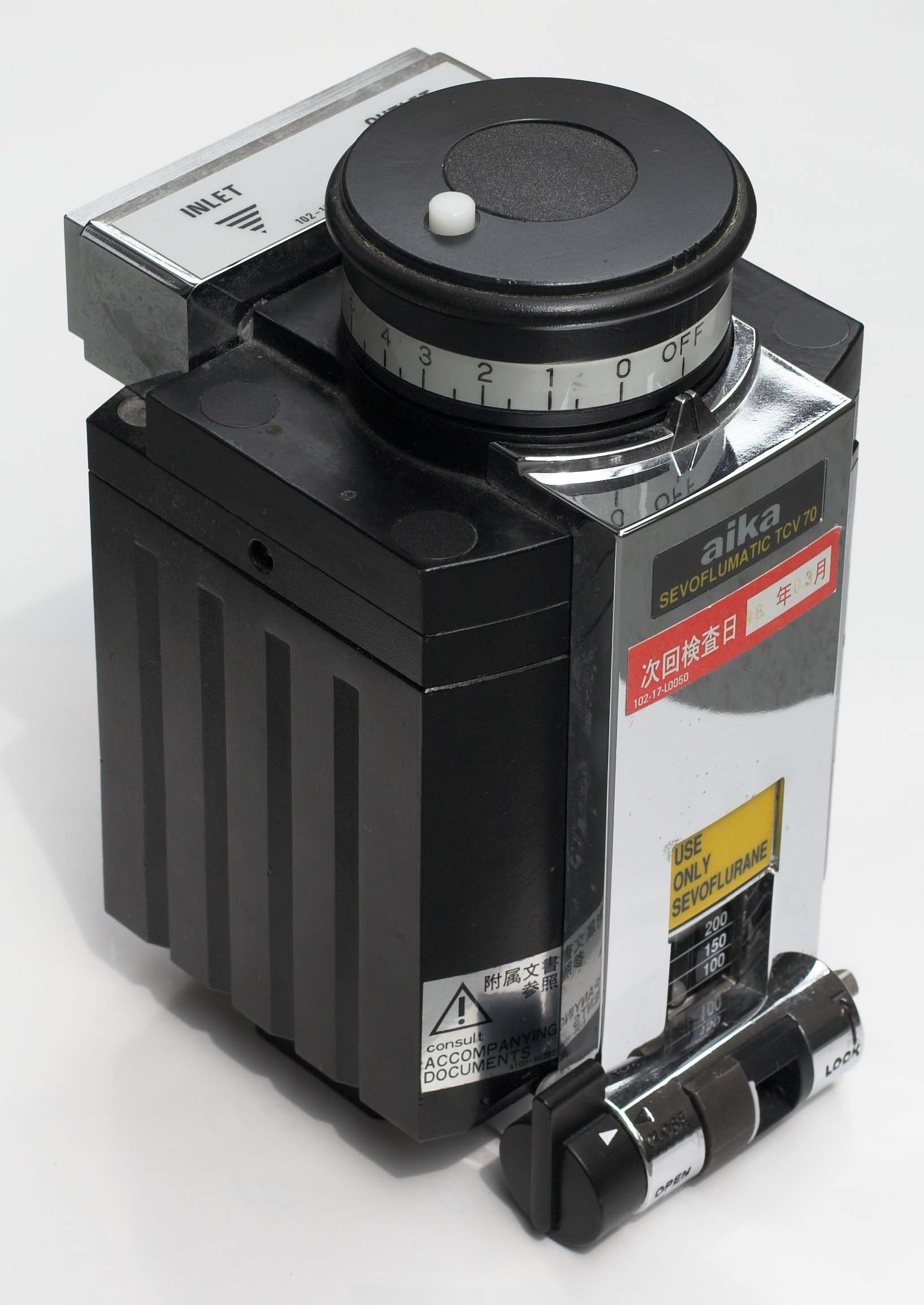 セボフルランの気化器 / A vaporizer of Sevoflurane